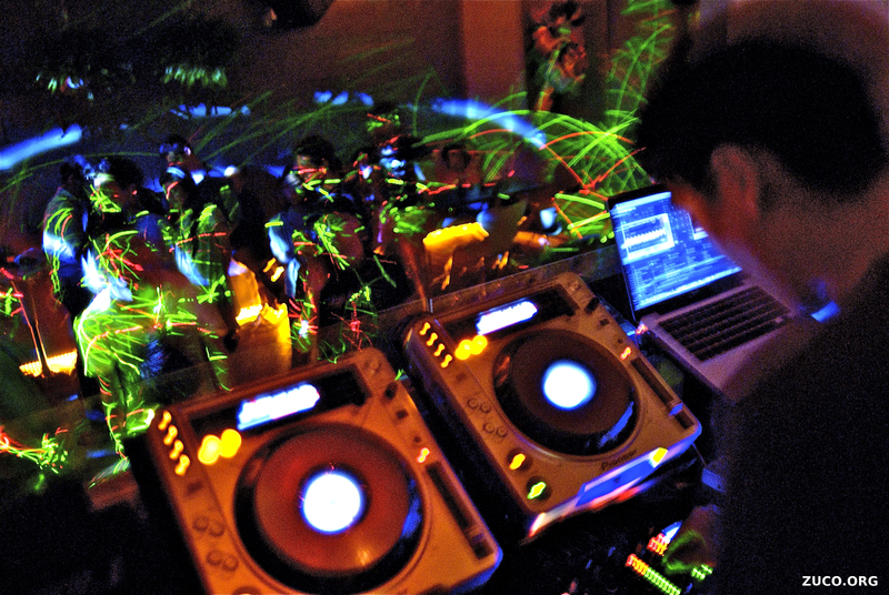 Confidential @Tangerine (2009-07) confidential_20090725_49